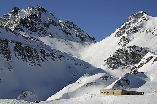 Skigebiet Pizol: Blick von der Pizolhütte Richtung Pizolgletscher